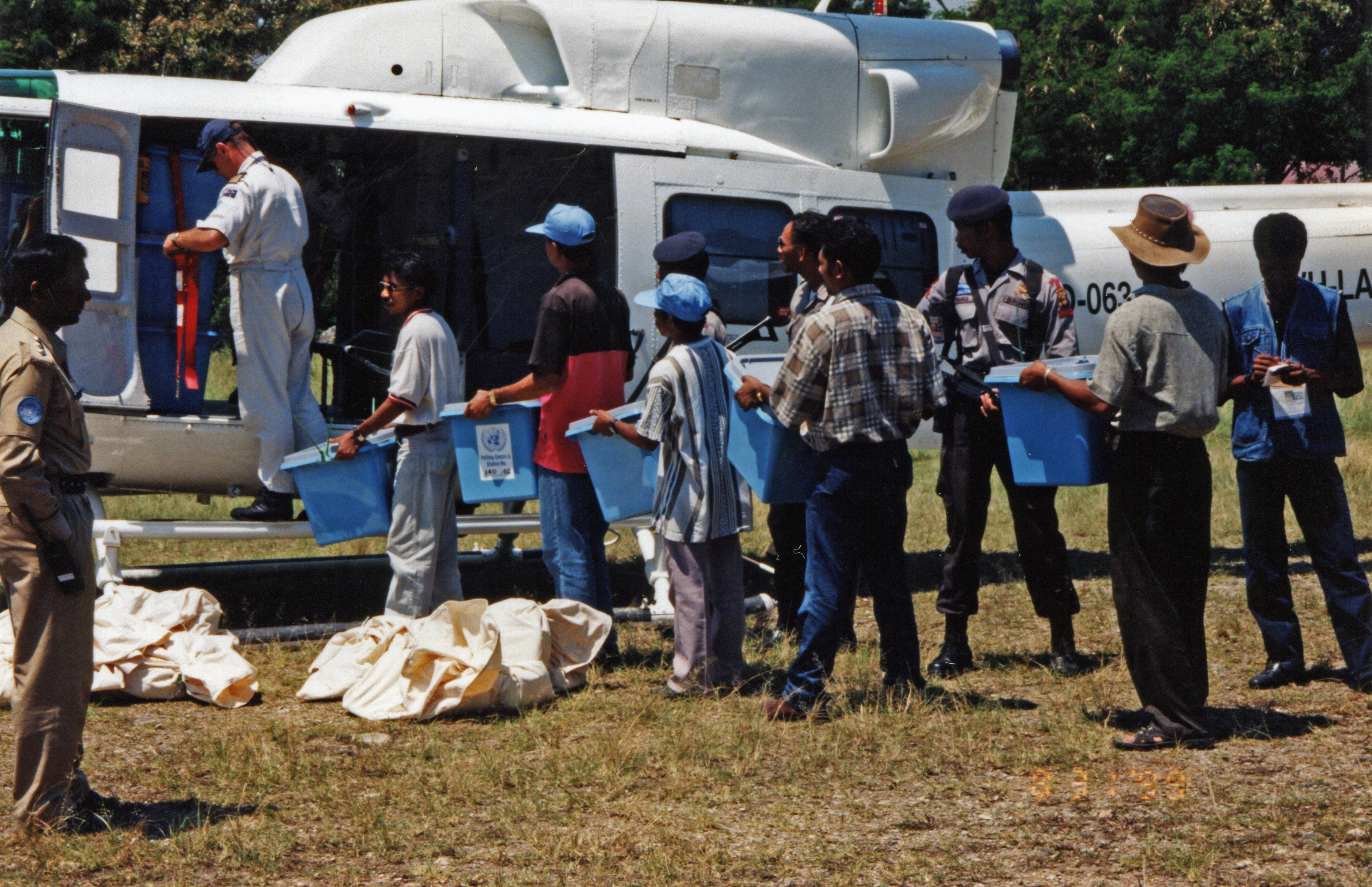 Transport der Stimmzettel vom Unabhängigkeitsreferendum in Osttimor 1999